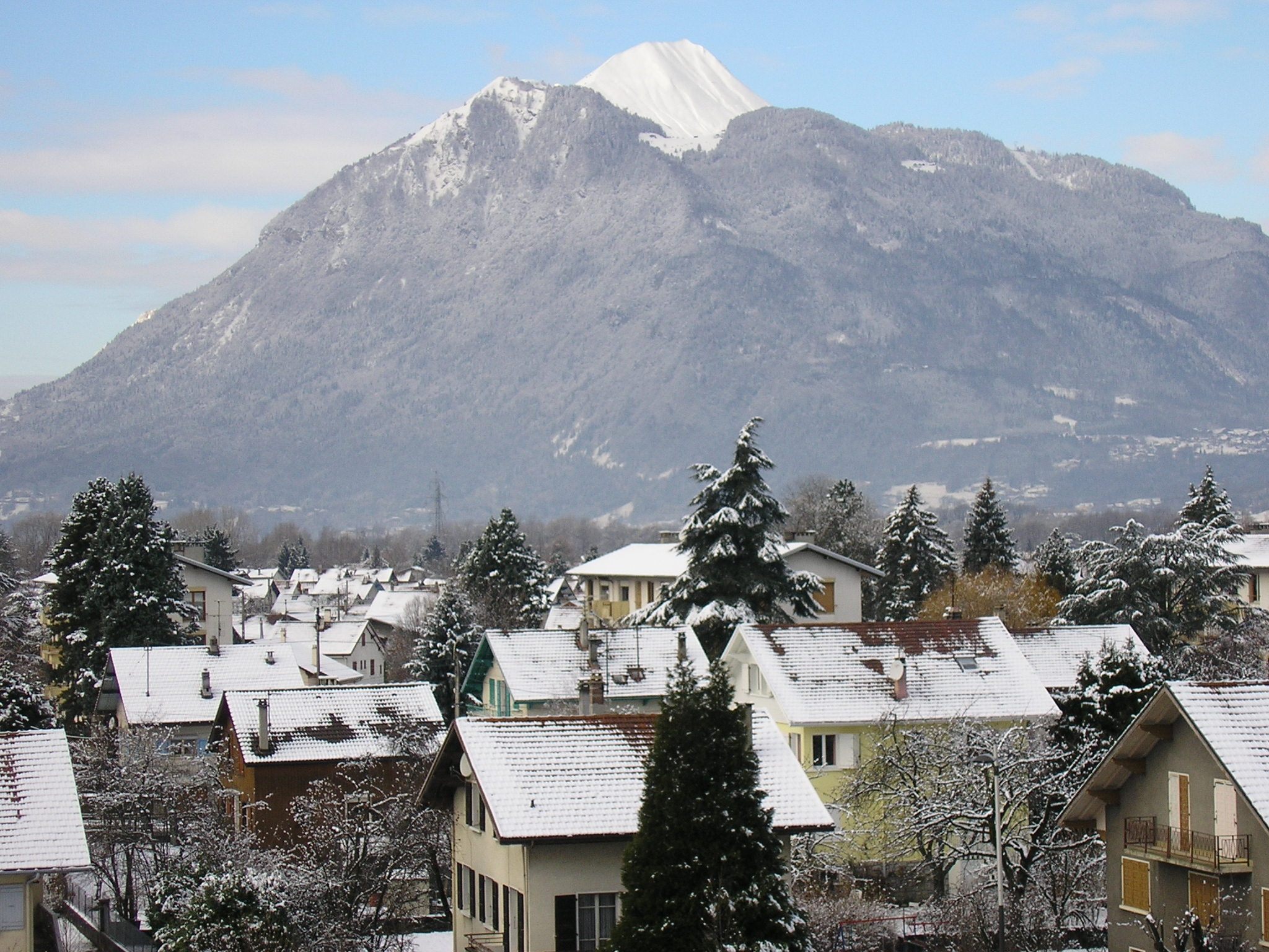 Der Berg Le Môle (1863m) von Cluses im Januar 2005